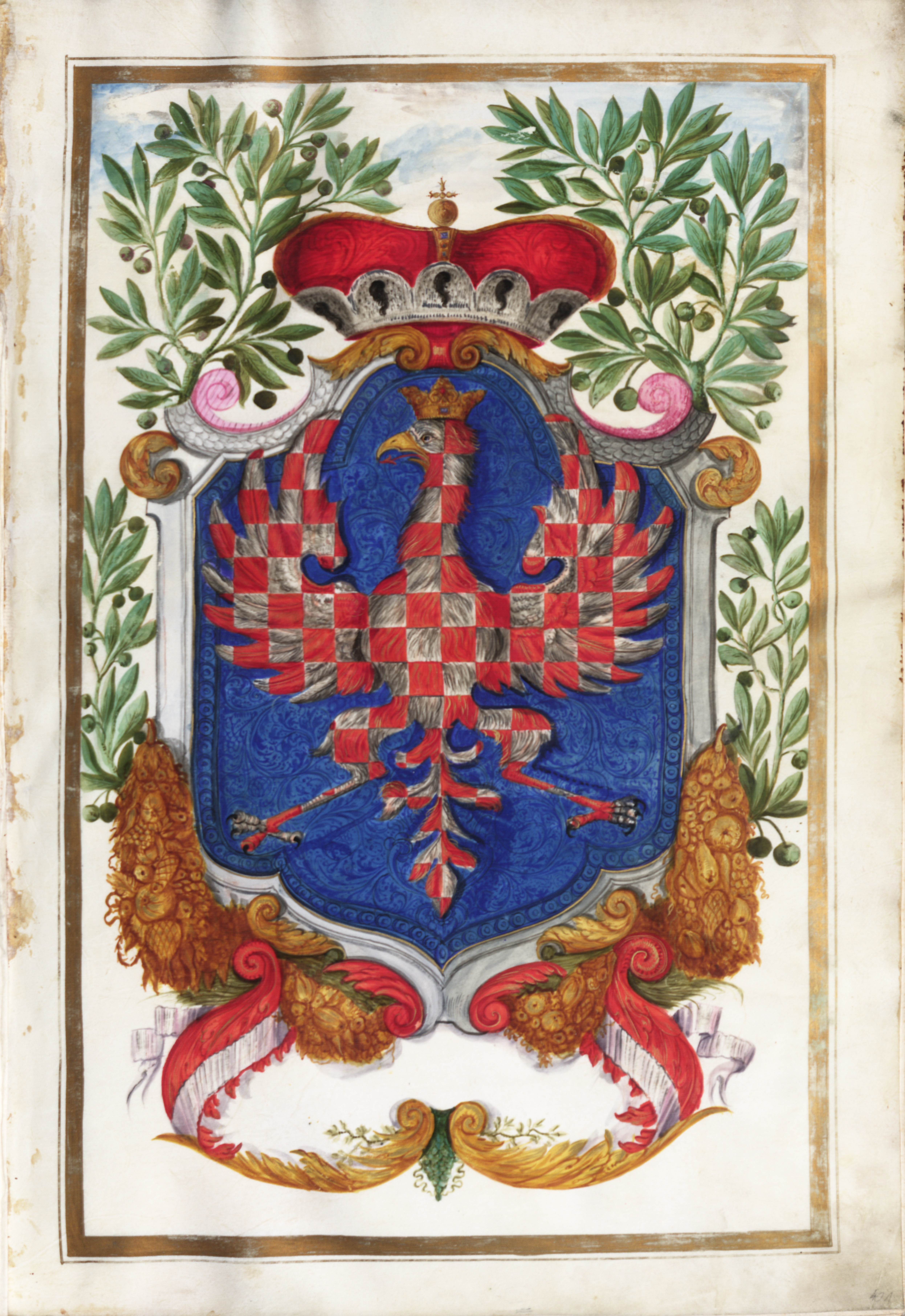 Moravský zemský znak namalovaný v trhovém kvaternu hradišťského kraje čís. 2, který byl založen v roce 1683. MZA v Brně, fond A 3 Stavovské rukopisy, inv. č. 296, Trhový kvatern hradišťského kraje čís. 2 (Větší statkův kvatern kraje hradišťského), 1683.